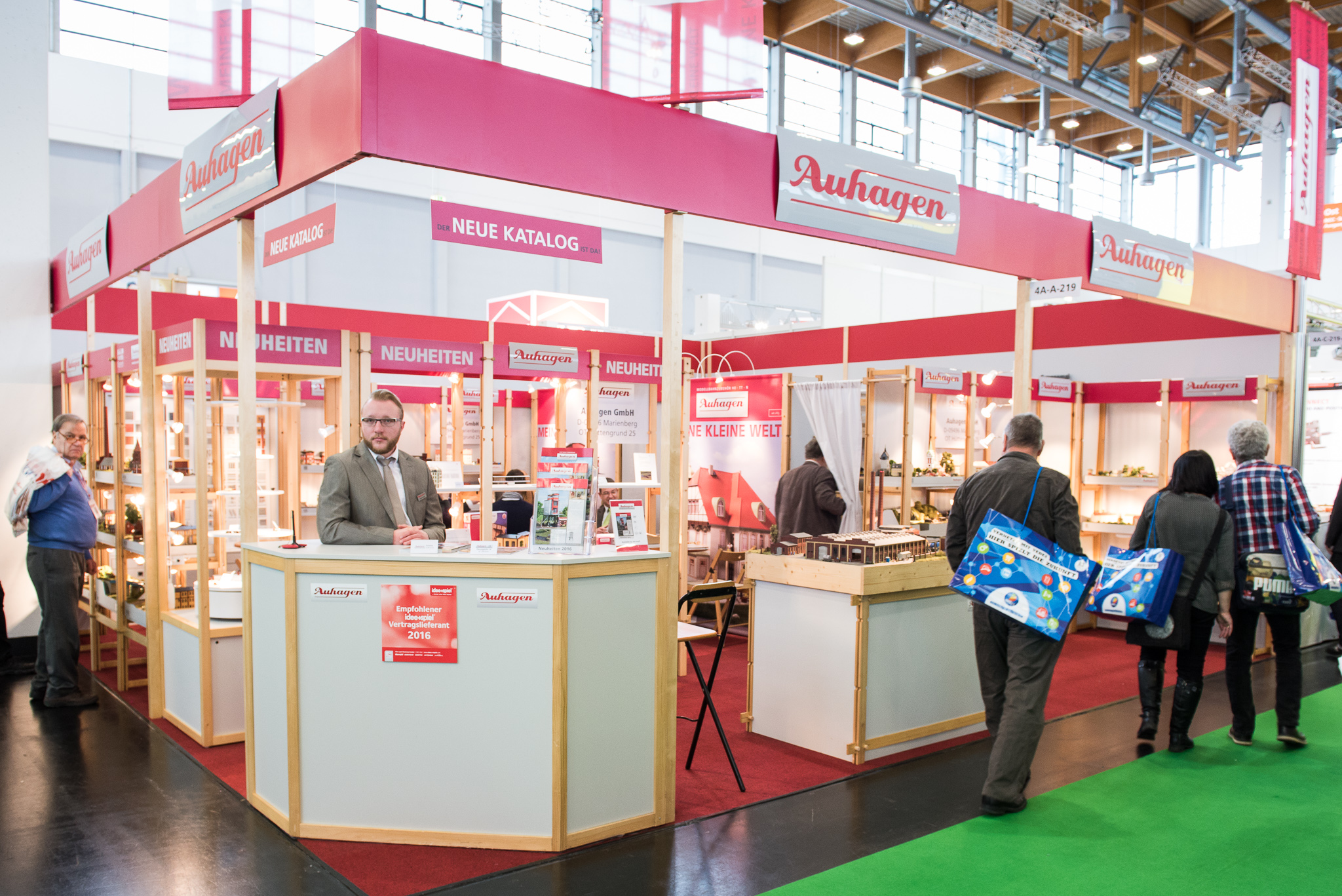 Auhagen GmbH,International Toy Fair Nürnberg,Messestand,Spielwarenmesse